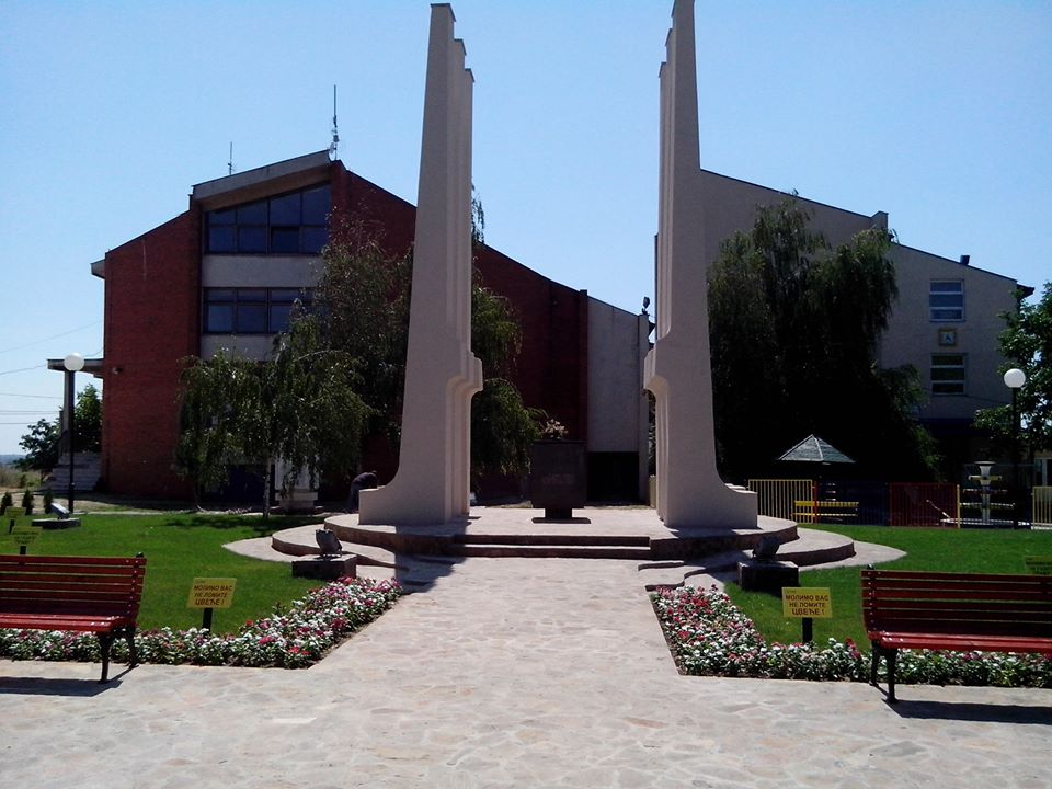 Slika preuzeta sa fb stranice - КОВАЧЕВАЦ Licensing